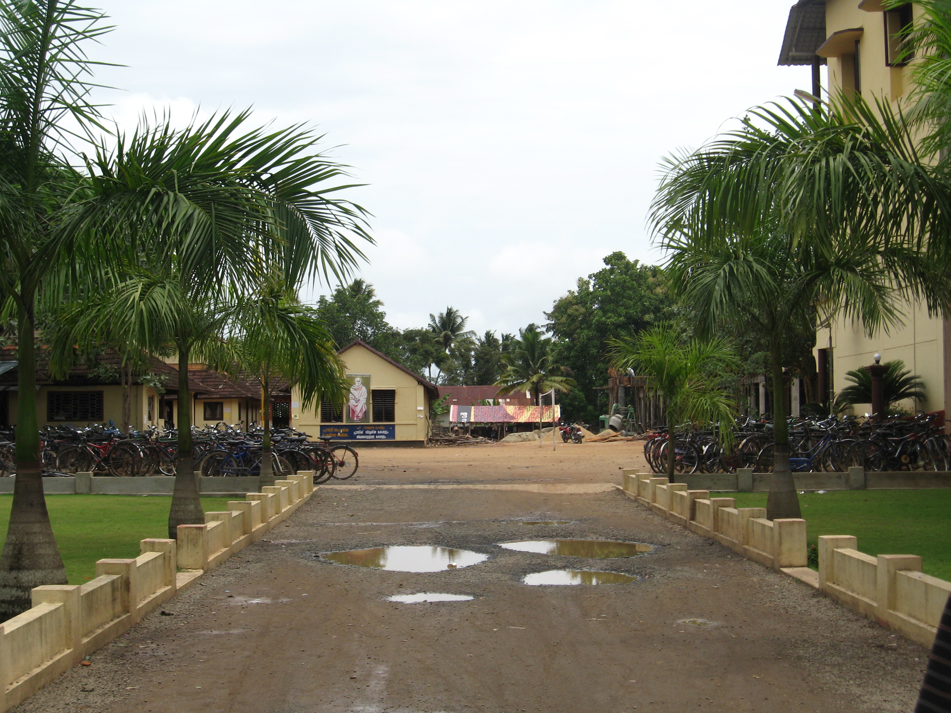 വൈക്കത്തെ സത്യാഗ്രഹ സ്മാരക വിദ്യാലയം